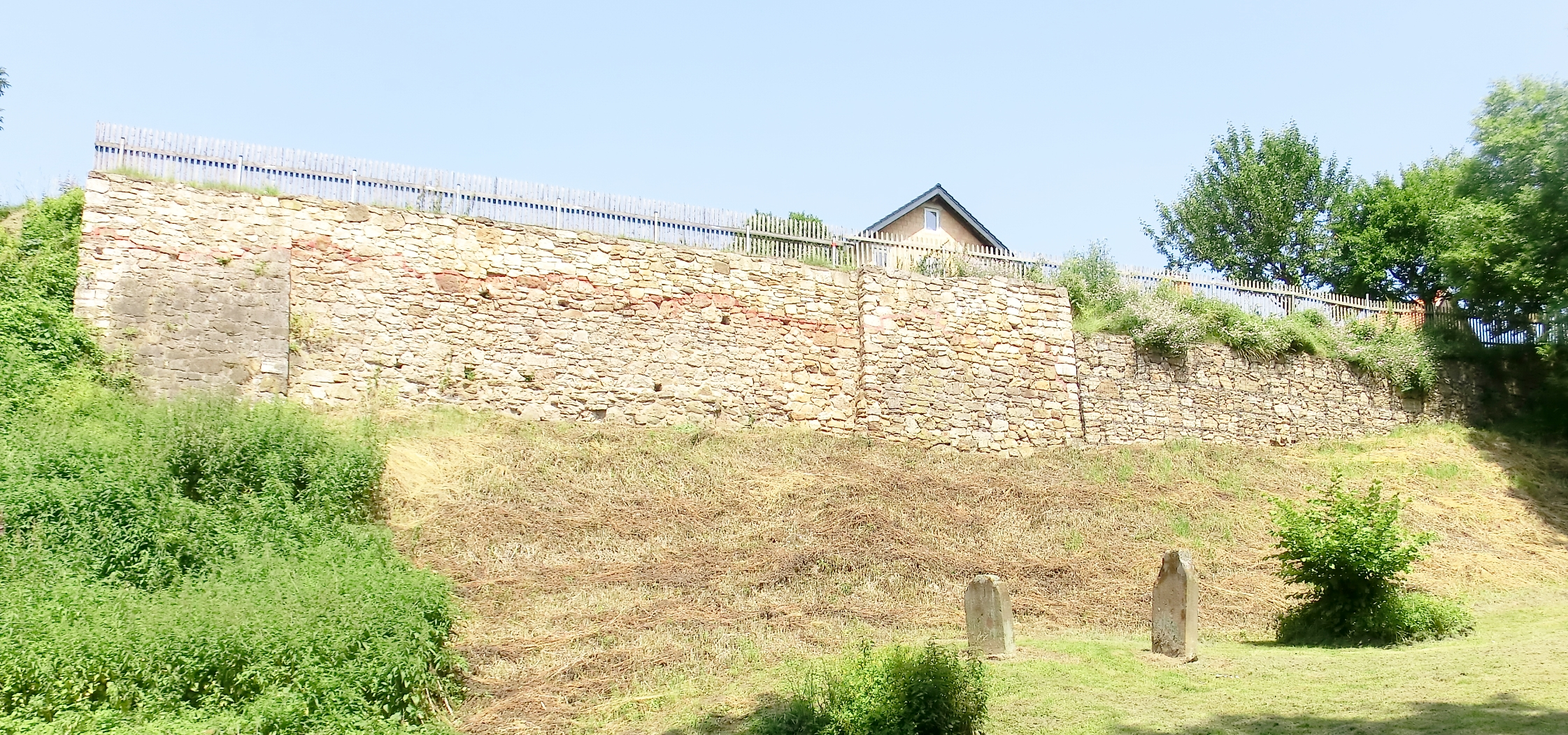 Reste der alten Stadtmauer Obermarsberg